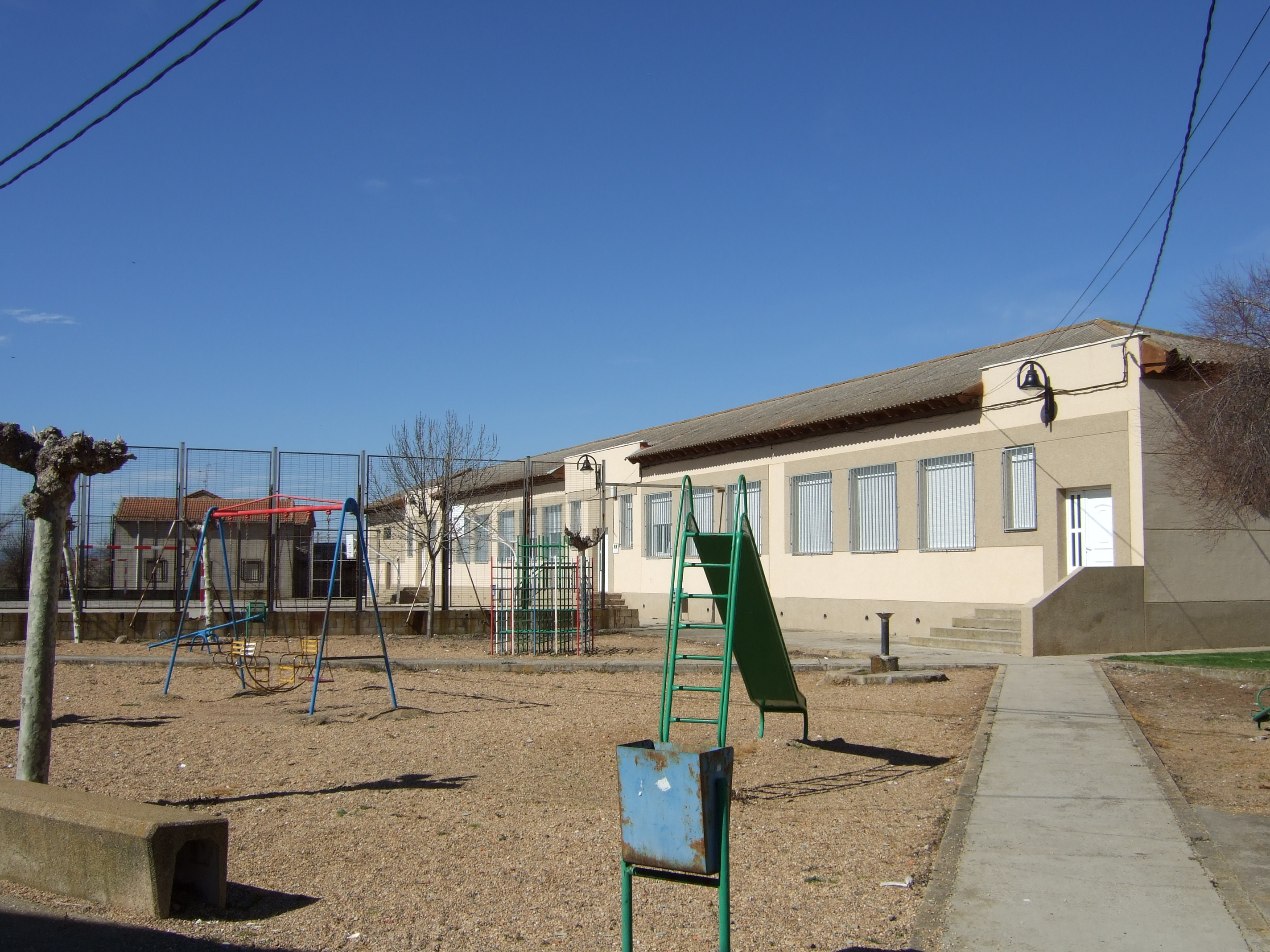 Escuelas de Palacios de la Valduerna.